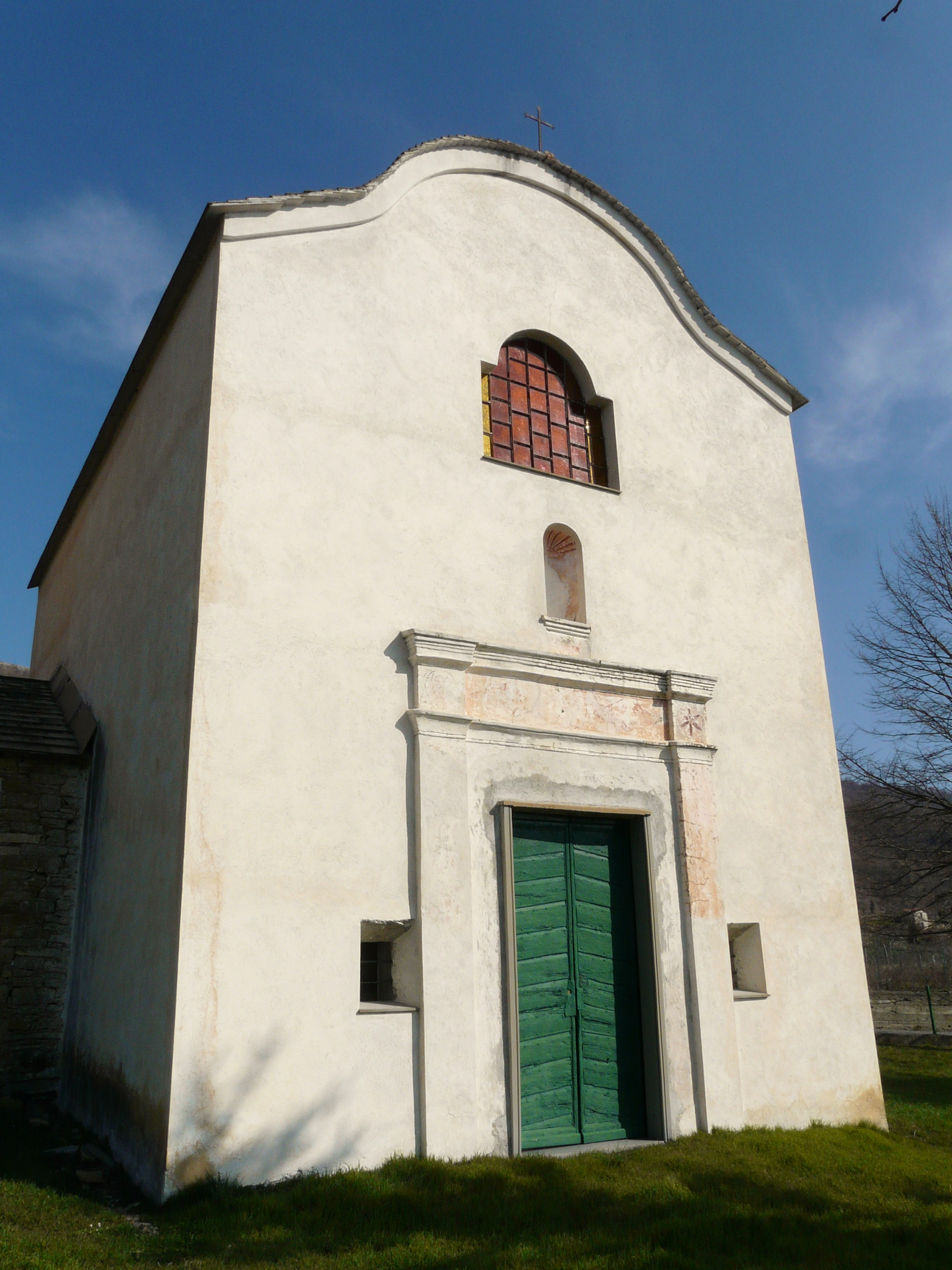 Santuario di Sant'Andrea, Aurigo, Liguria, Italia